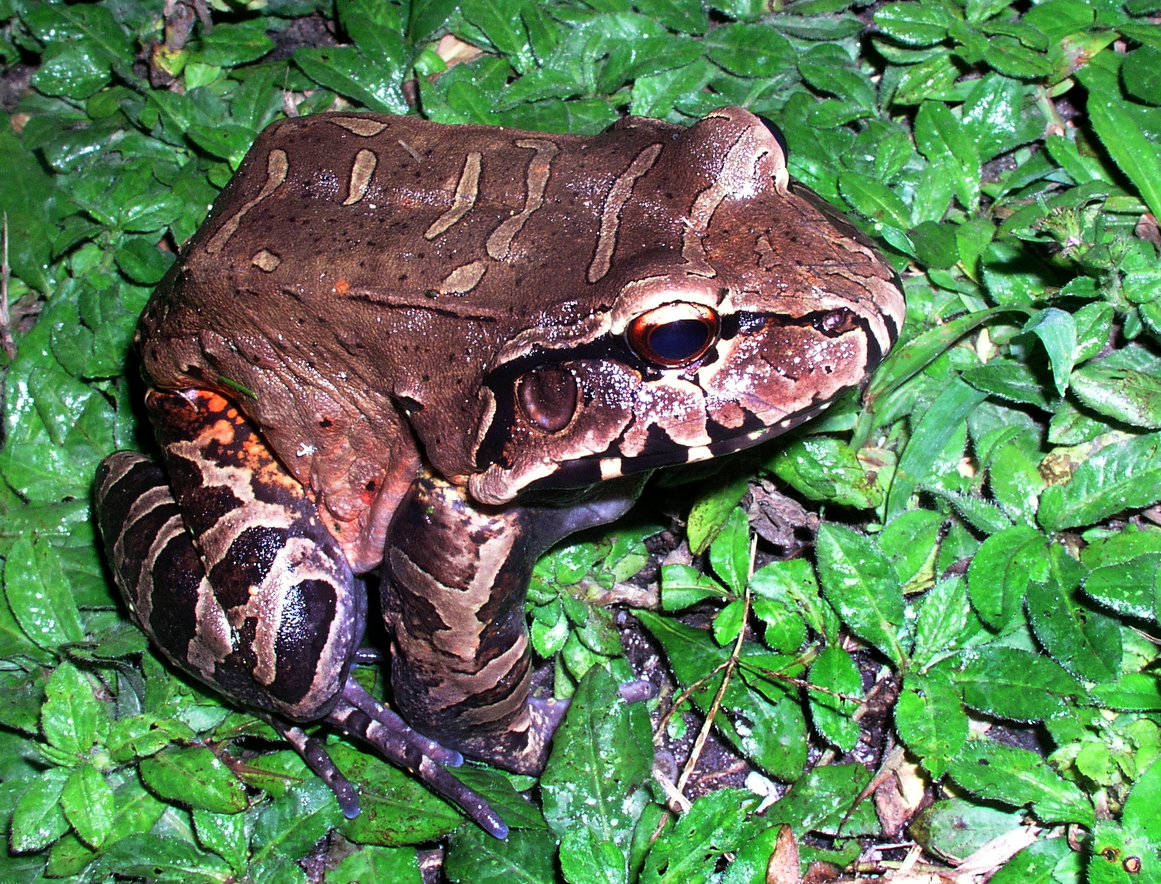 Leptodactylus knudseni, Palestina, Nueva Cajamarca, San Martin, Pérou